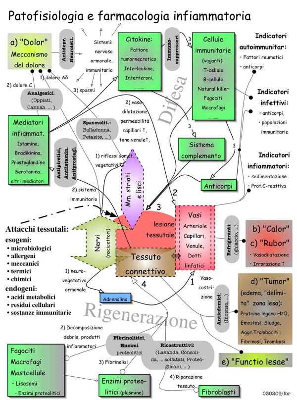 Grafica: Medicina: infiammazione acuta, mediatori, fluido, fibrina, neutrofili, essudato, ascesso, riparazione, fibrosa, cronicizzazione, artrite reumatoide, gotta, granulomatosa, cronica, corso studio assistito CSA, scuola superiore medico tecnica, Lugano, Ticino, Svizzera